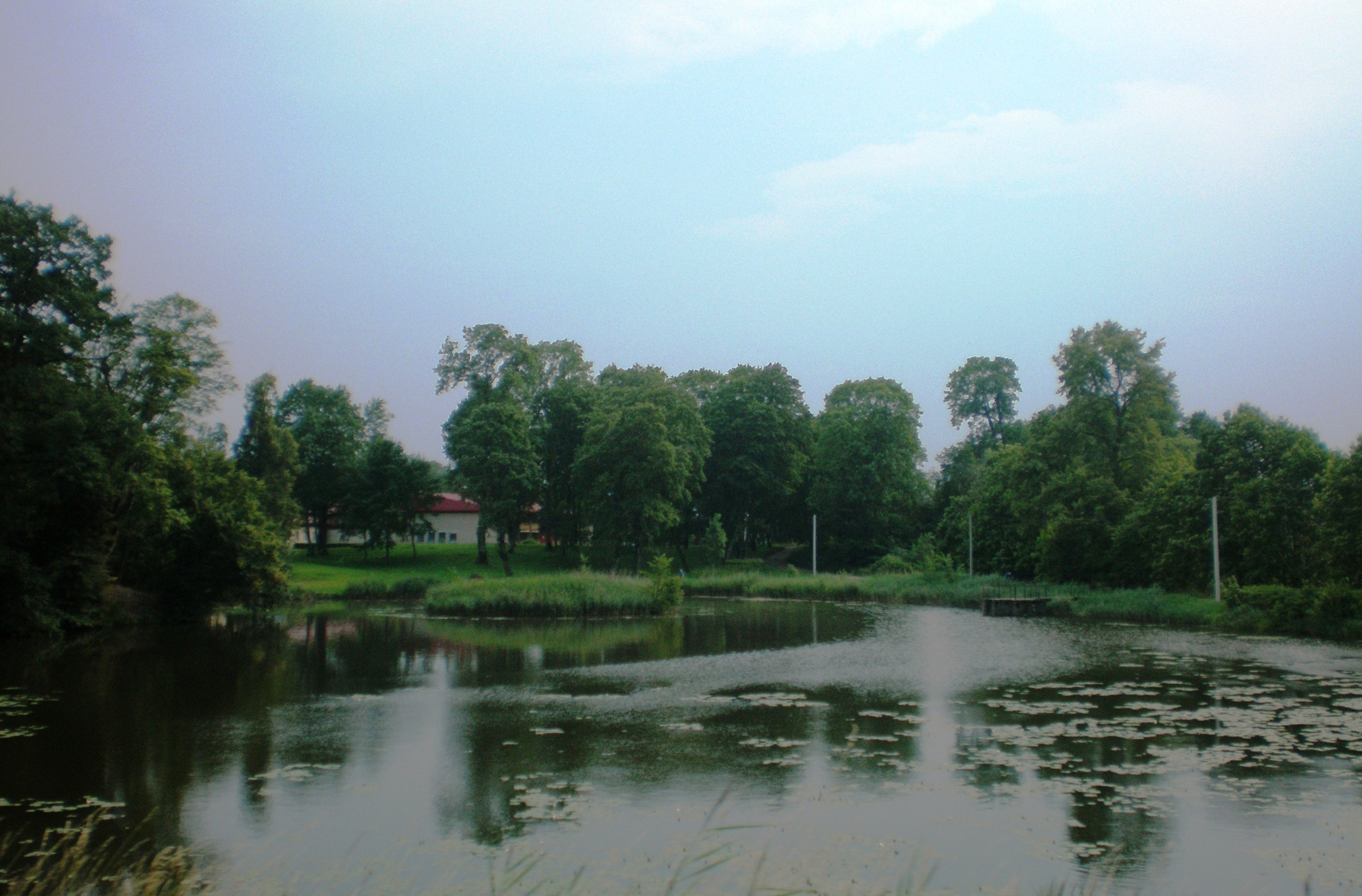 Blinstrubiškių V tvenkinys, Raseinių raj.